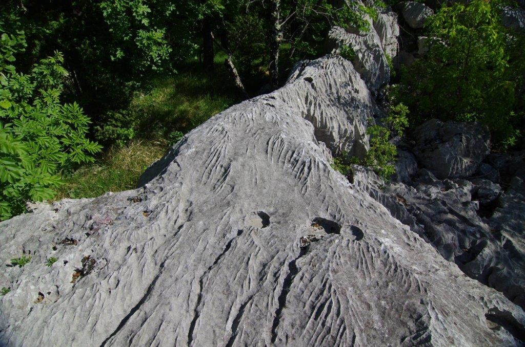 Žlebič